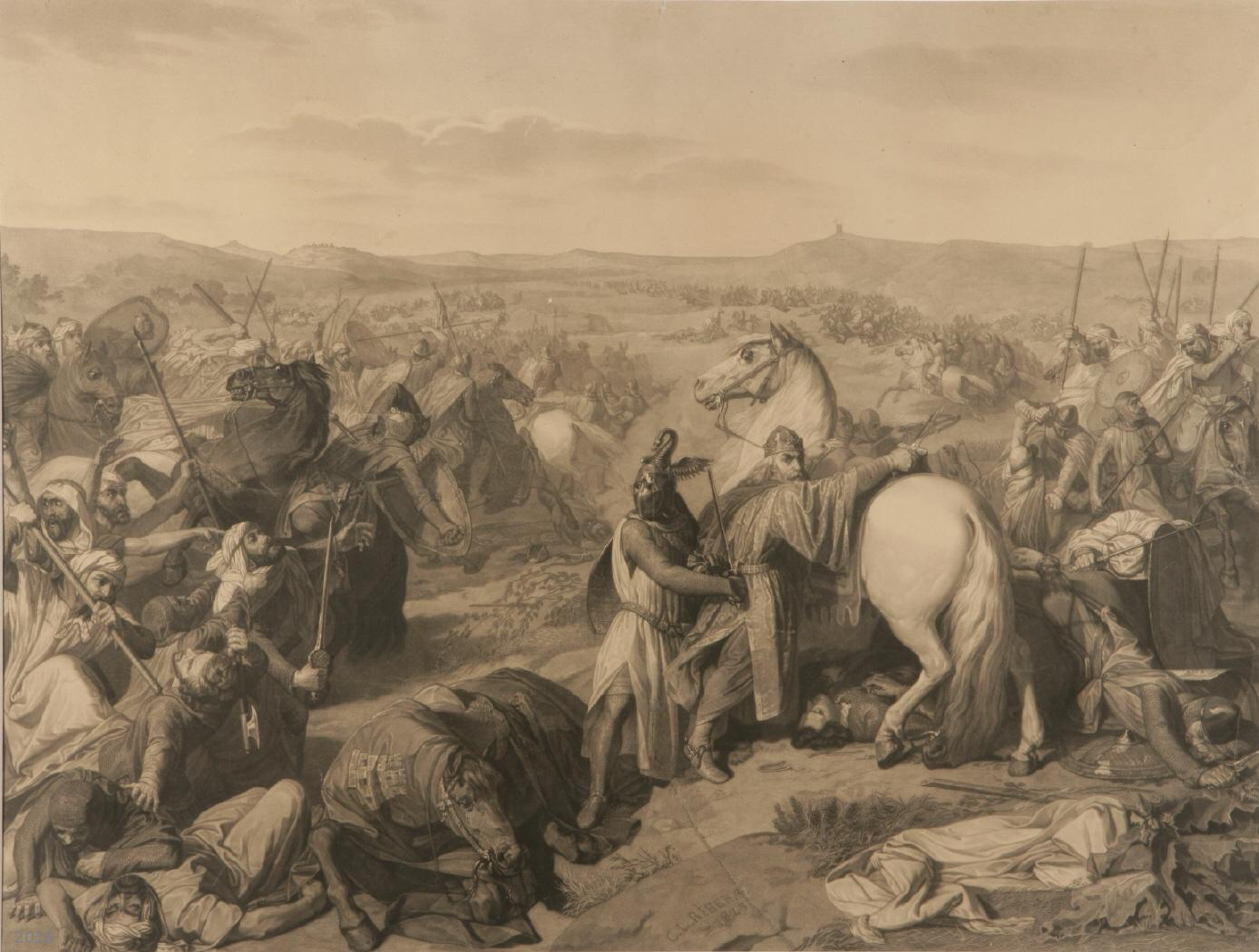 Batalla de la Sagra, aguafuerte de Domingo Martinez Aparici (copia de una pintura de Carlos Luis de Ribera).